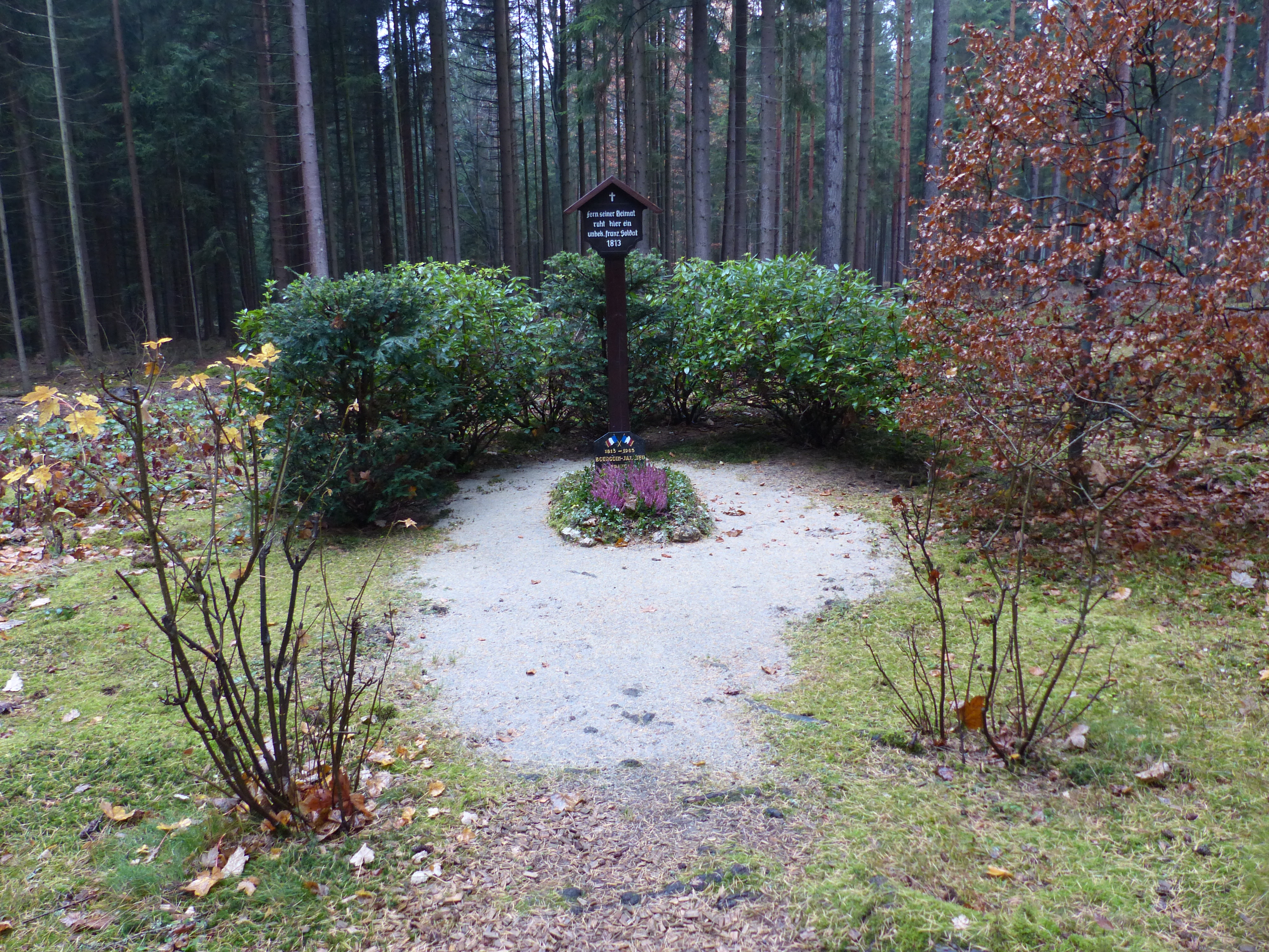 Franzosengrab auf dem Gebiet der Stadt Rehau